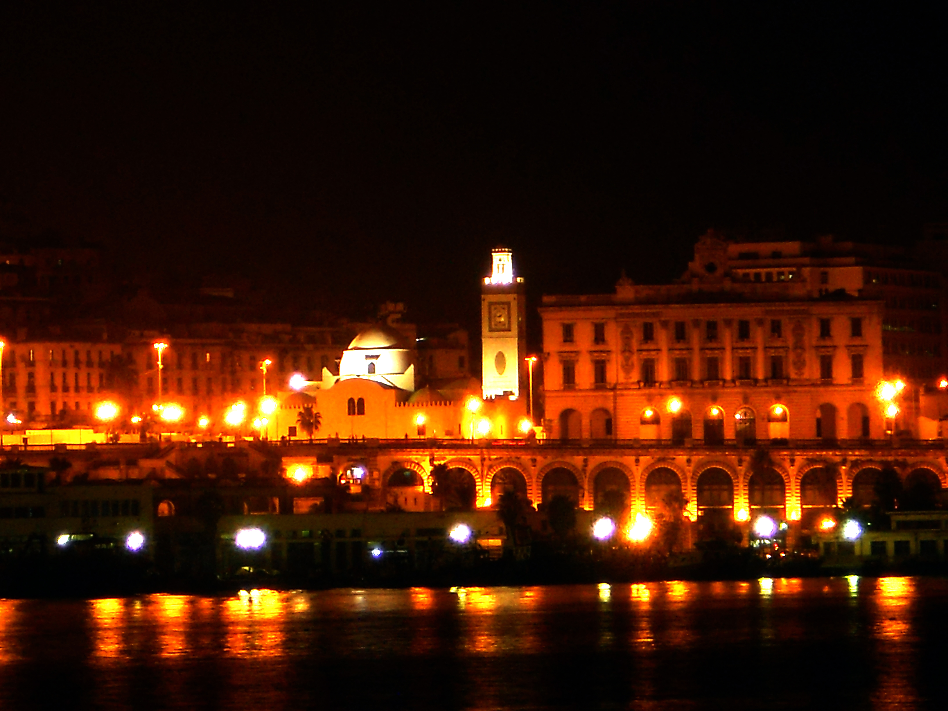 vue de la mer.